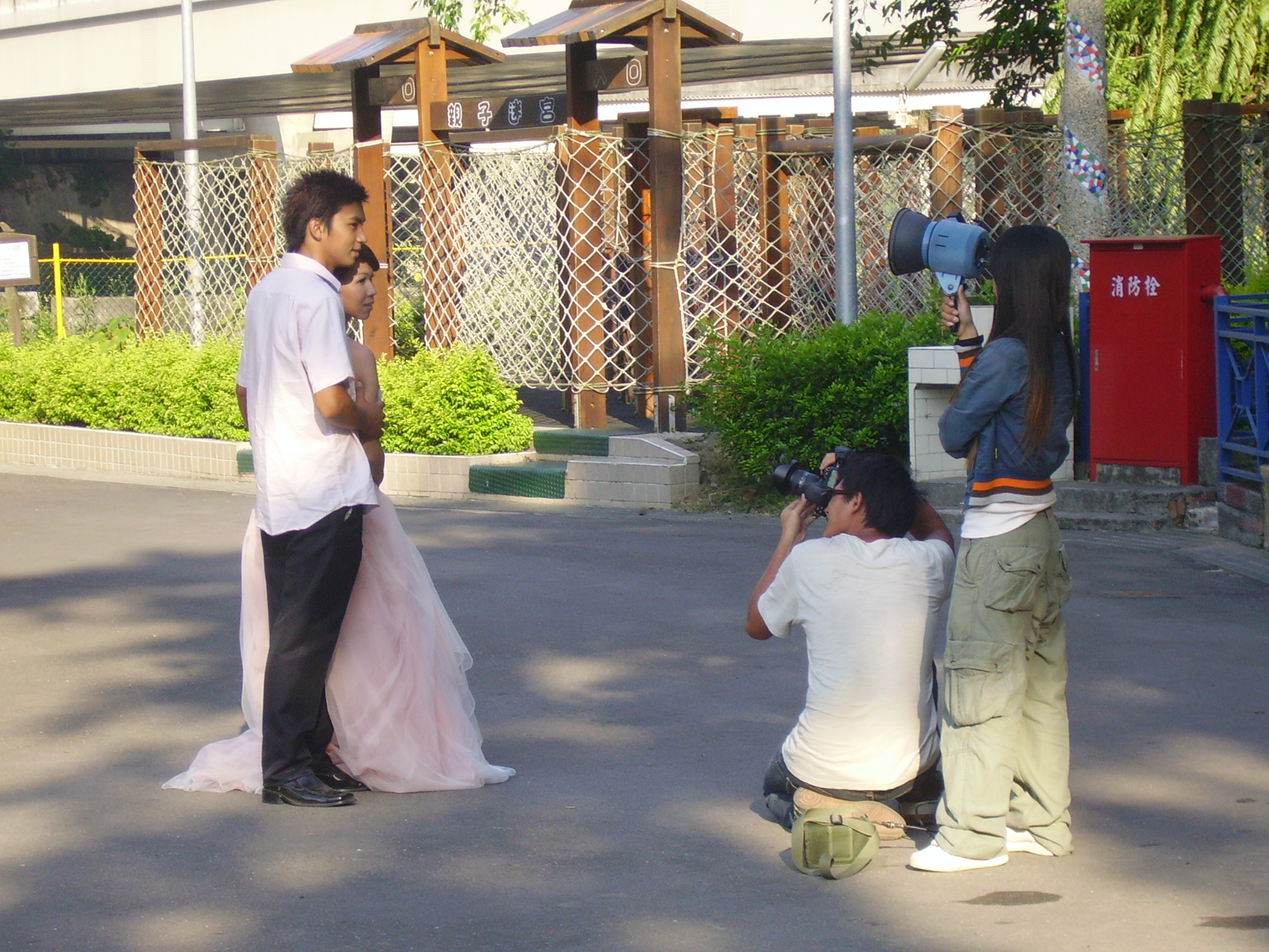 臺北市戶外婚紗攝影。